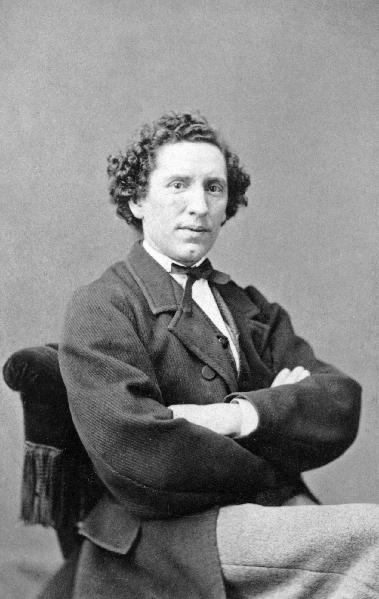 Theodor Ignaz Marckhl (kallad Théodore), premiärdansare vid Kungliga Operan 1863